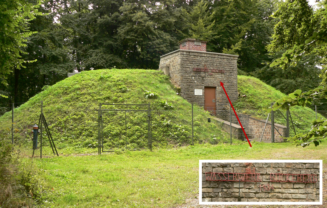 Wasserspeicher auf dem Bückeberg von 1934, angelegt zur Wasserversorgung der Besucher der Reichserntedankfeste